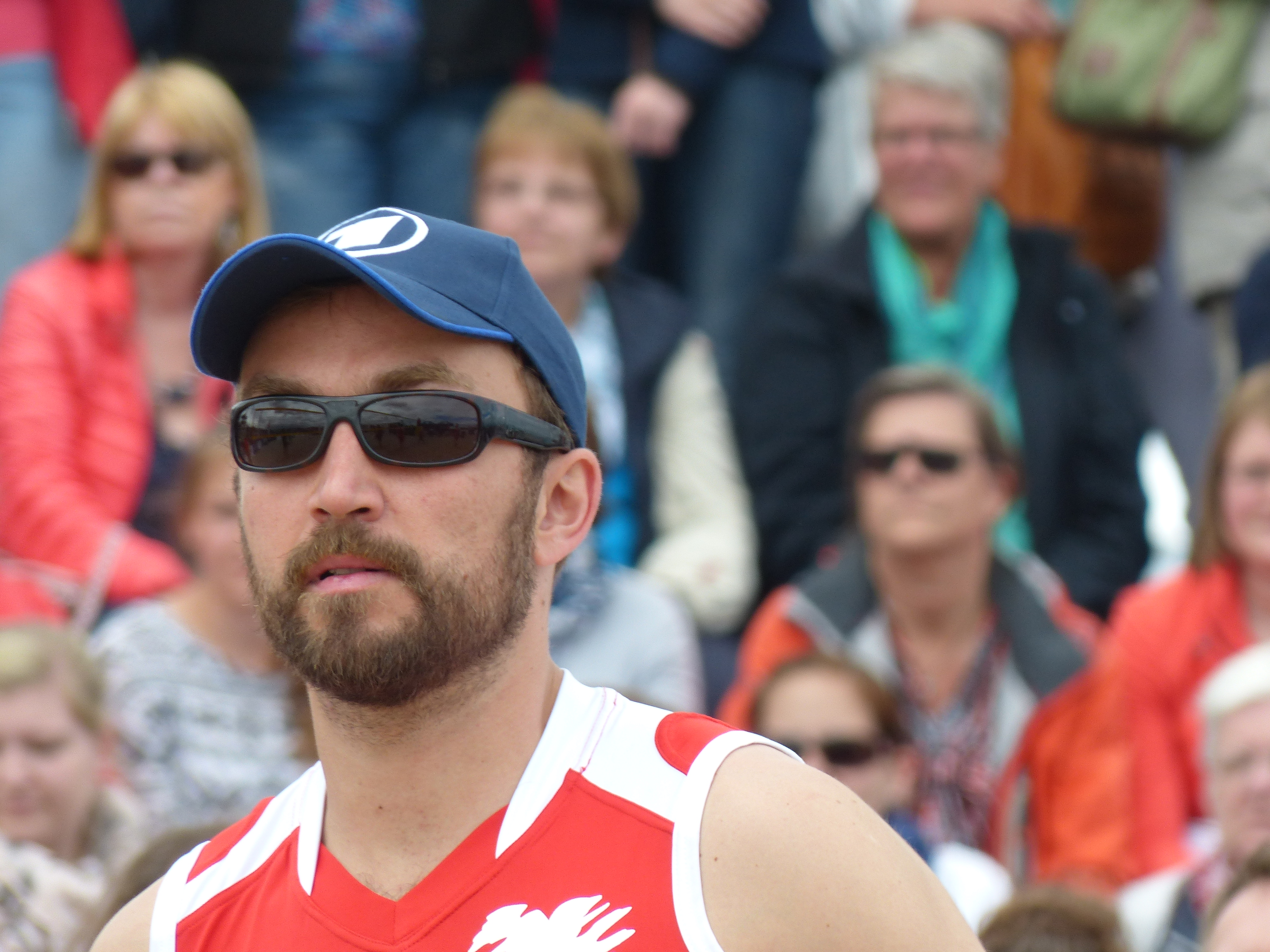 Philipp Oehme, Beachvolleyball-Starcup 2014